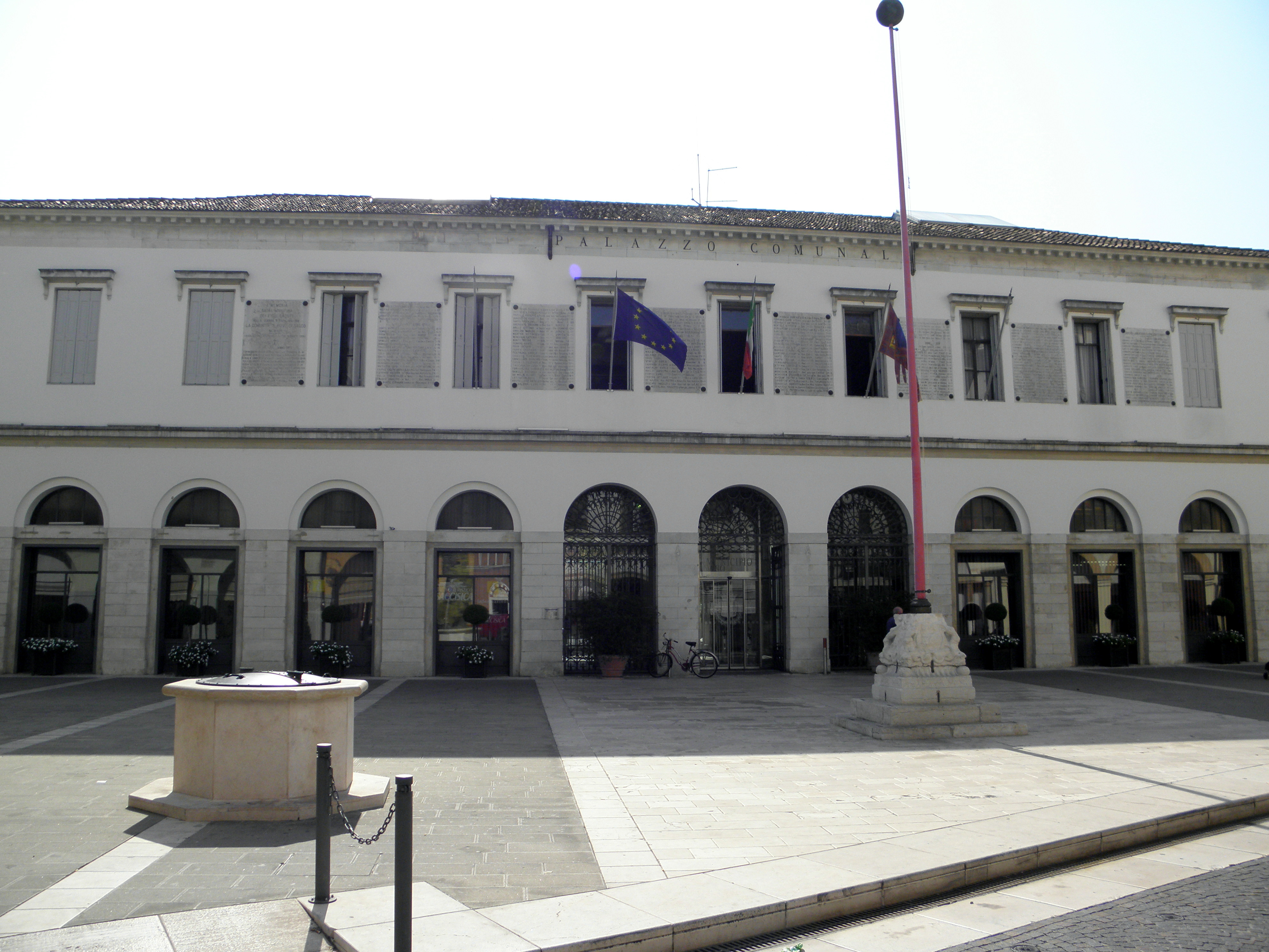 Piove di Sacco: Palazzo Jappelli, sede municipale.